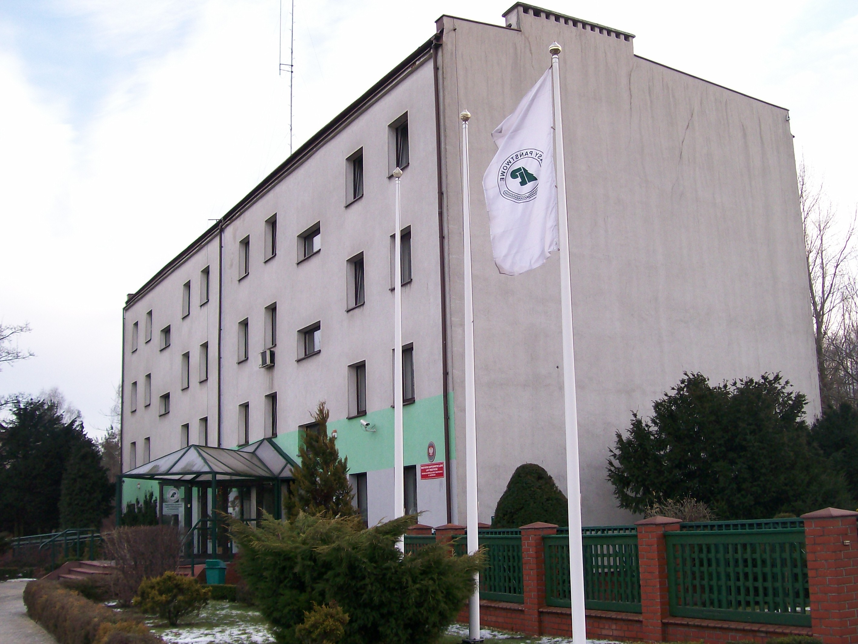 Regionalna Dyrekcja Lasów Państwowych w Katowicach - Katowice ul. Huberta 43/45